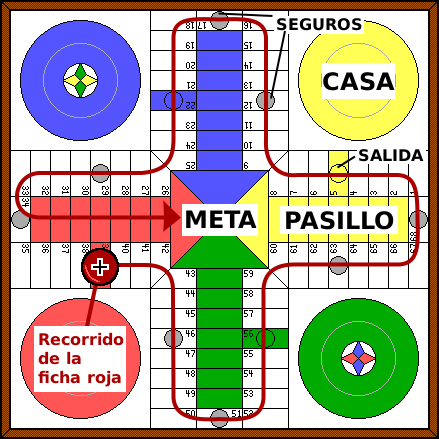 Muestra algunos de los términos usados en el juego del parchís